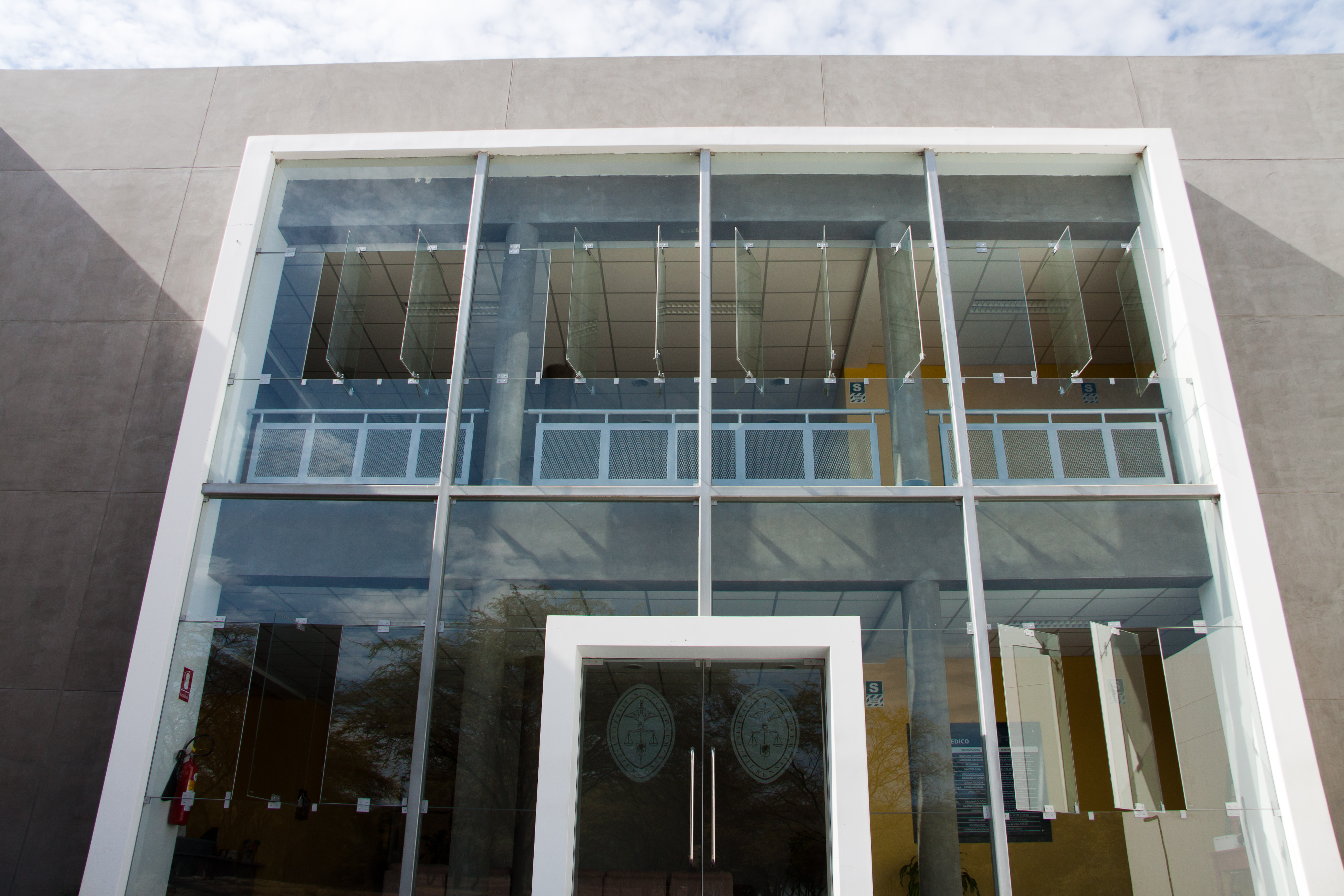 Centro de atención médica de la Universidad de Piura - UDEP